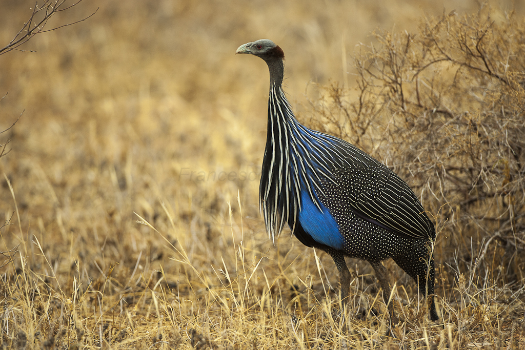 Vulturine Guineafowl - Samburu - KenyaNH8O7020